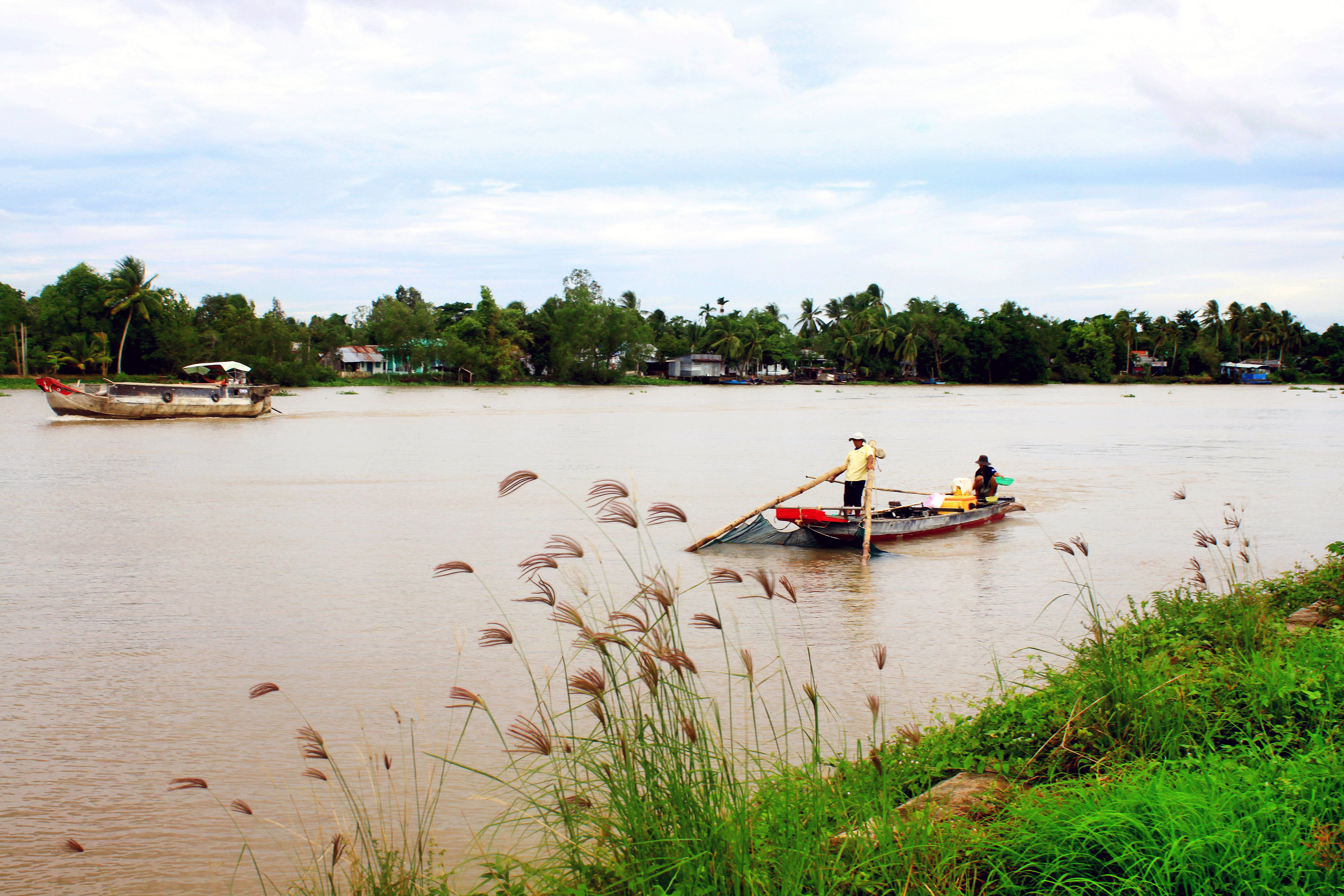 Sông Cần Thơ, đoạn chảy qua xã Mỹ Khánh, thuộc huyện Phong Điền, TP Cần Thơ, Việt Nam.